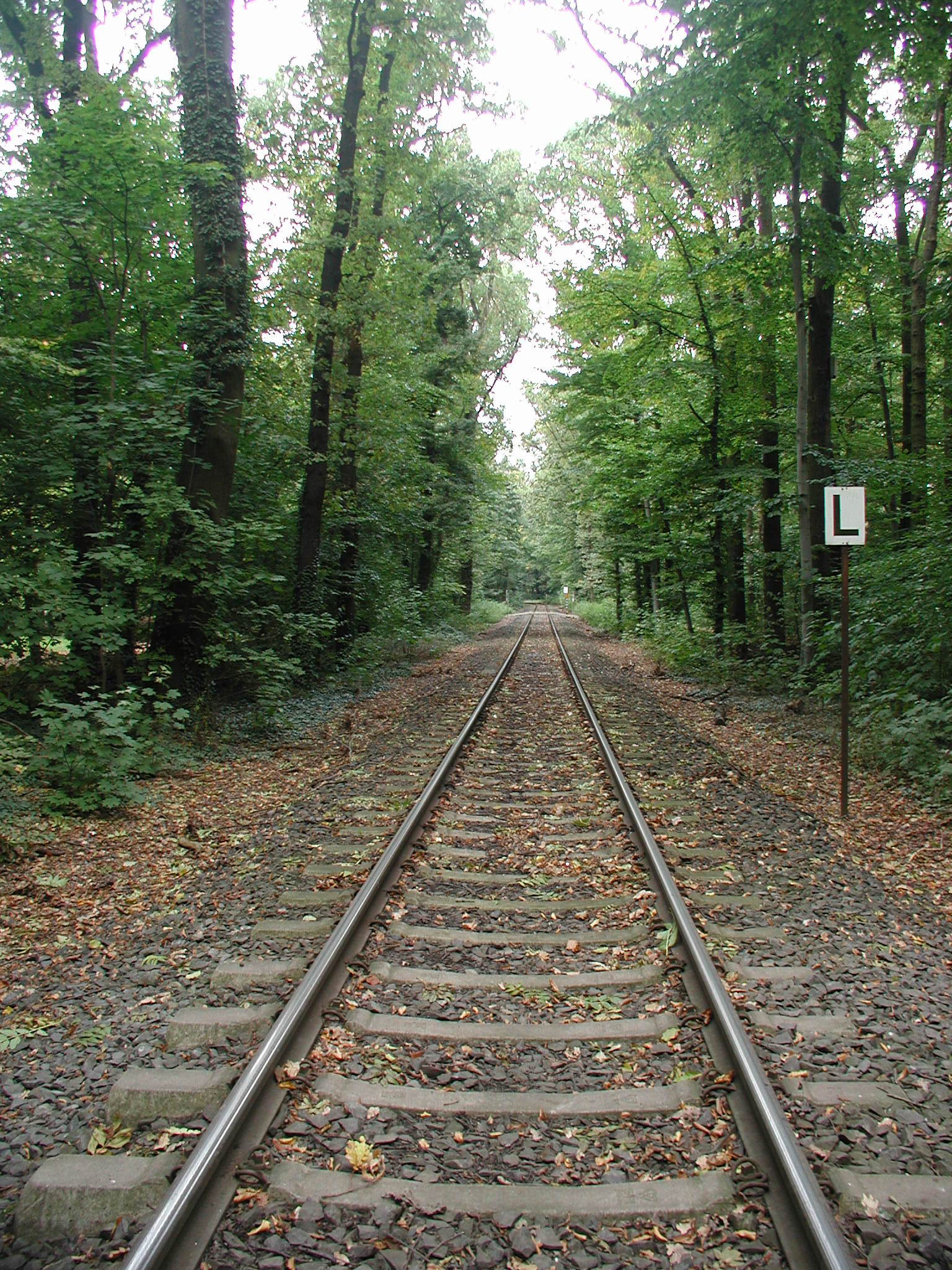 HGK-Trasse, Kölner Stadtwald